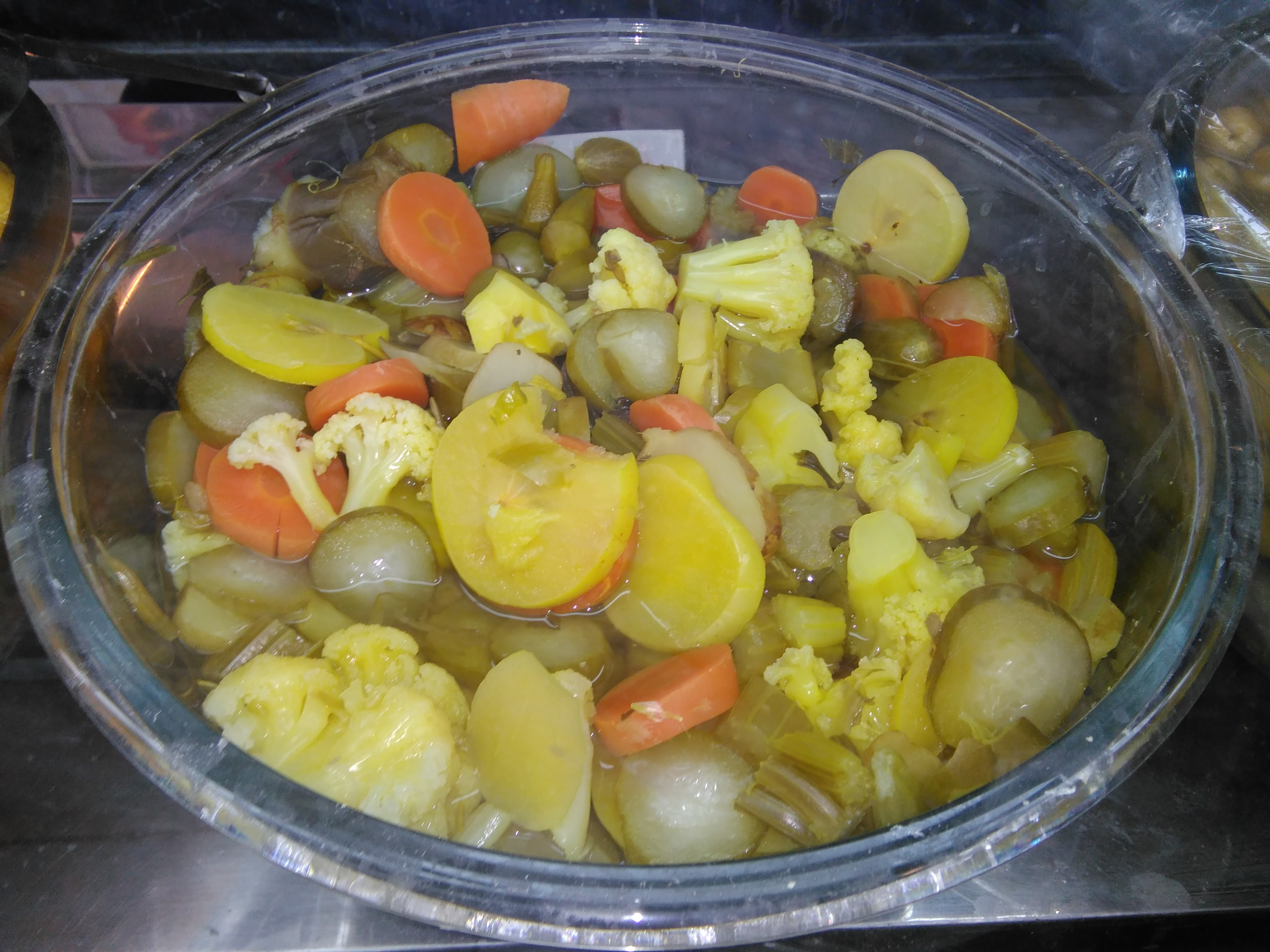 ترشی مخلوط